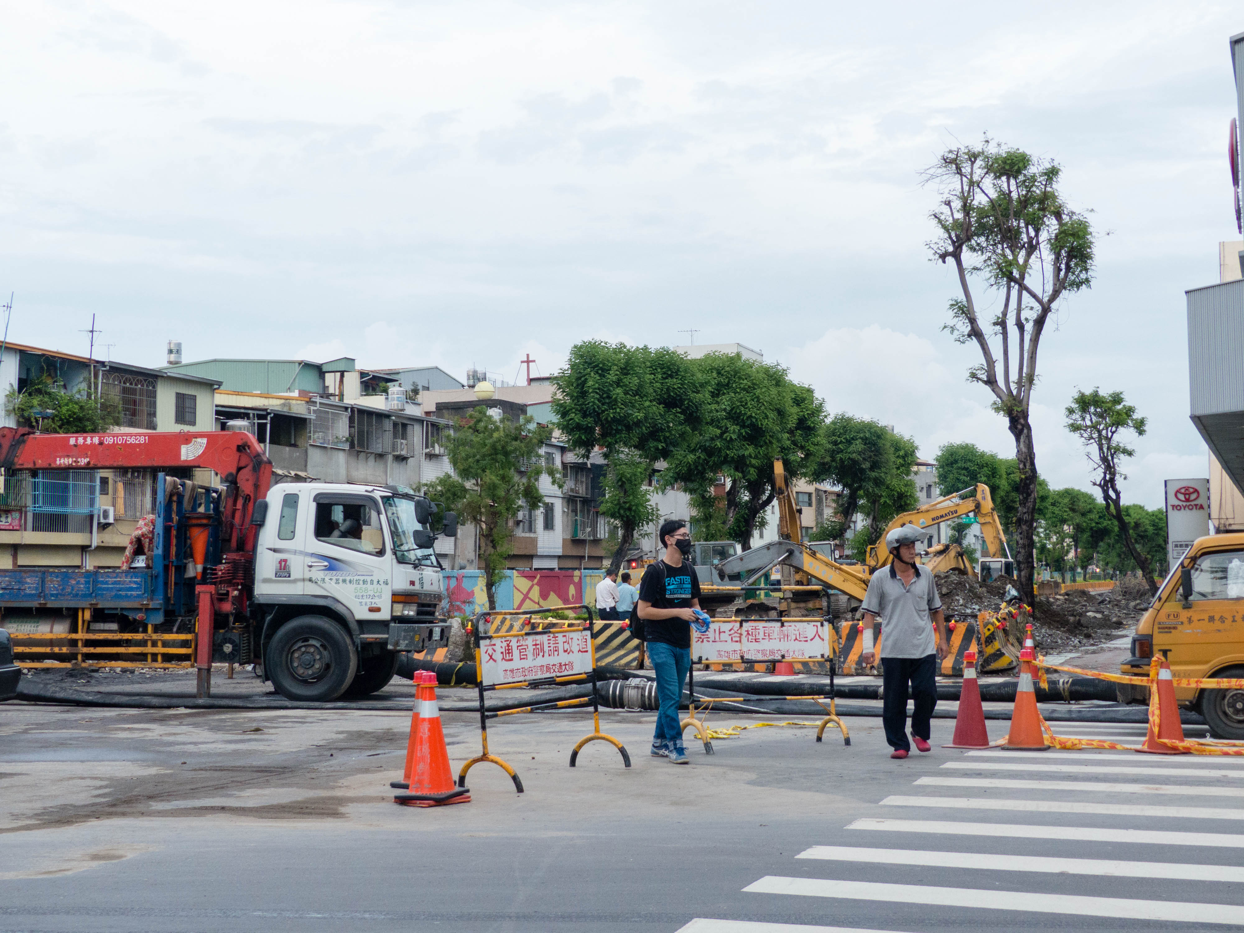 中文（台灣）: 從高雄市苓雅區三多二路與凱旋二路路口南望凱旋二路，氣爆受損最嚴重路段之一，受連日大雨影響，箱涵復建進度緩慢。